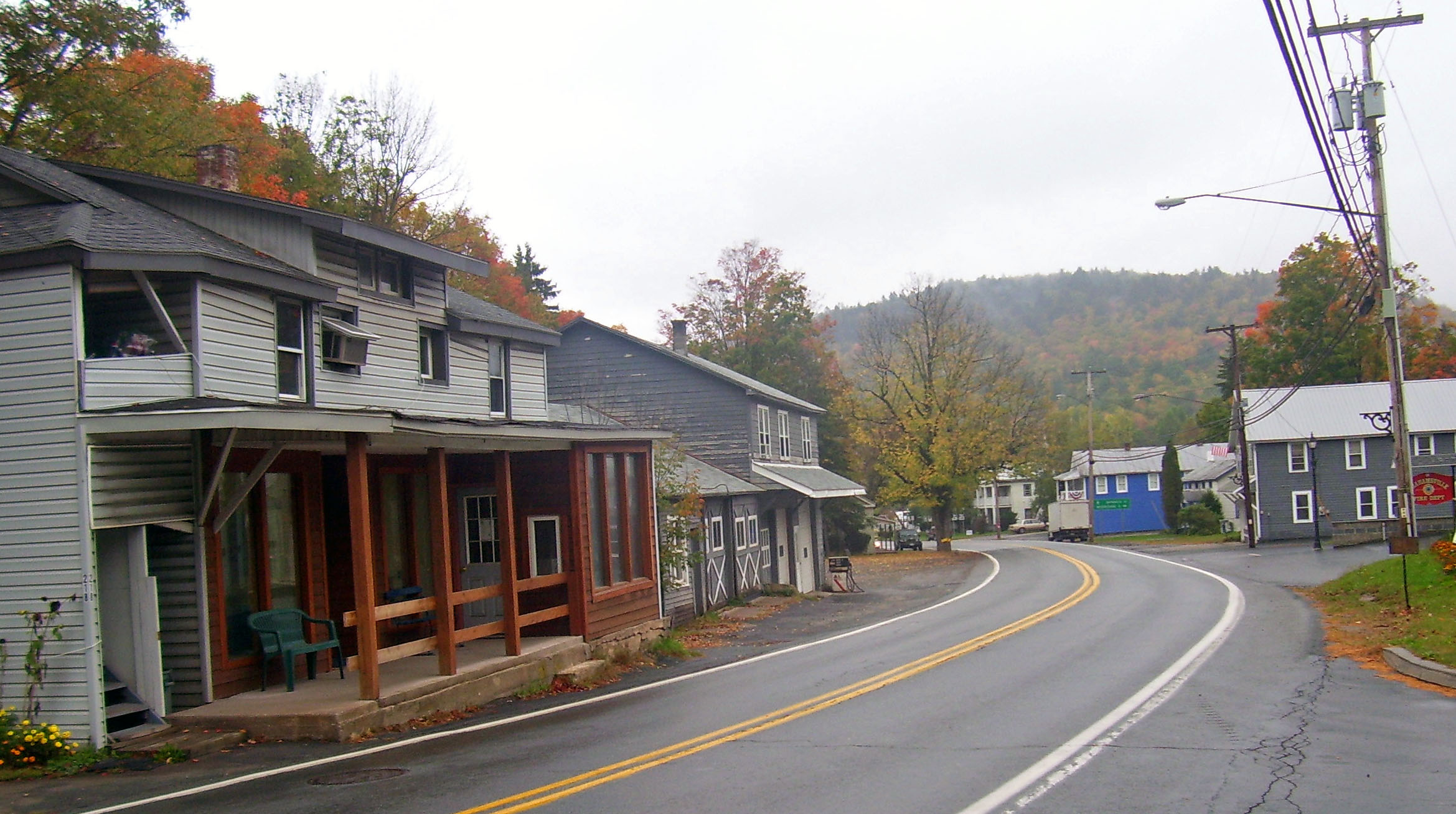 Hamlet of Grahamsville, NY, USA